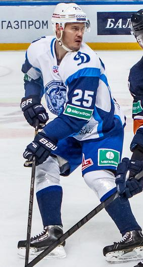 Защитник минского «Динамо» Лукаш Крайчек во время матча чемпионата КХЛ против хабаровского «Амура» 5 ноября 2014 года.